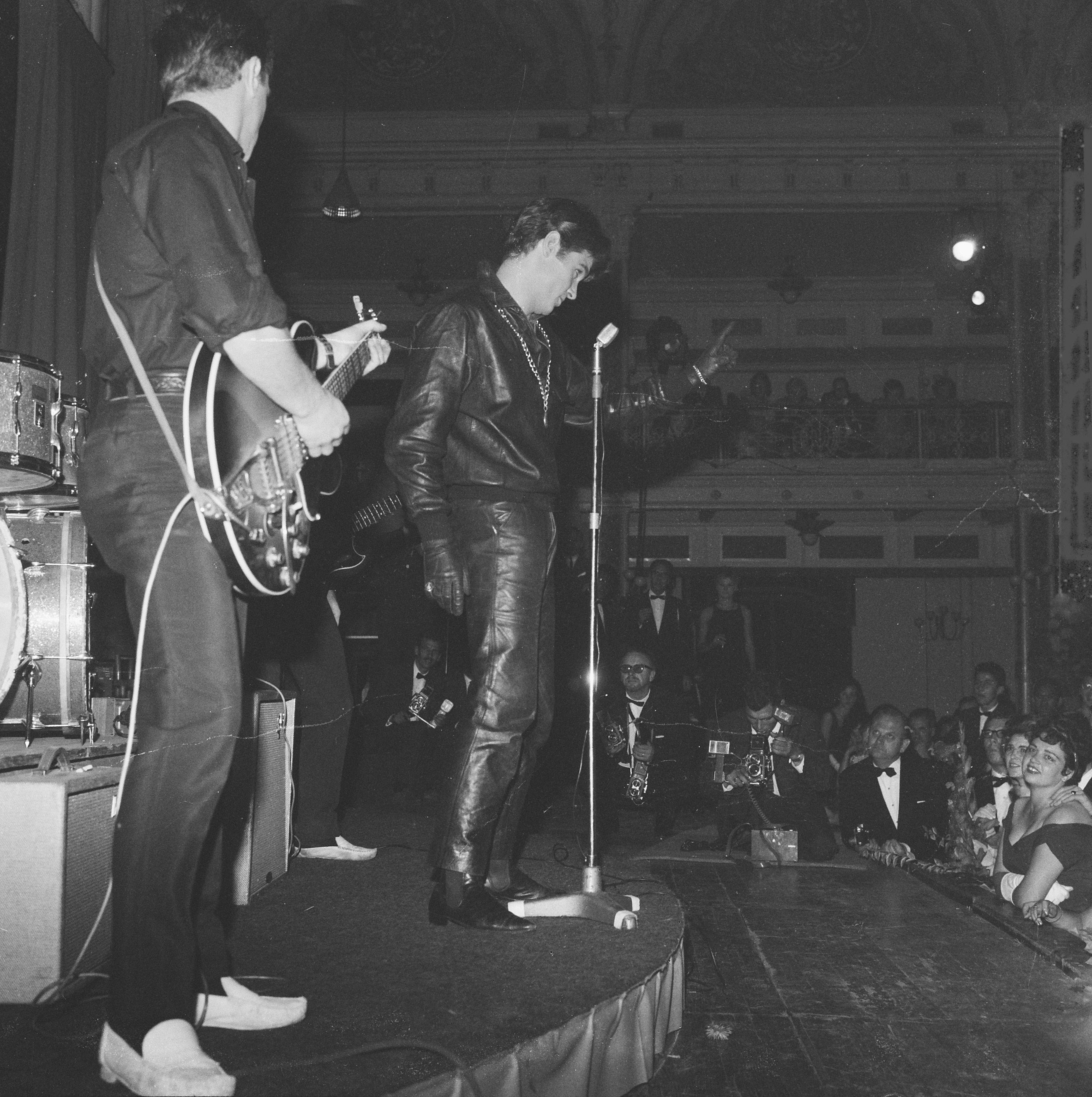 Grand Gala du Disque. Vince Taylor and the Playboys.